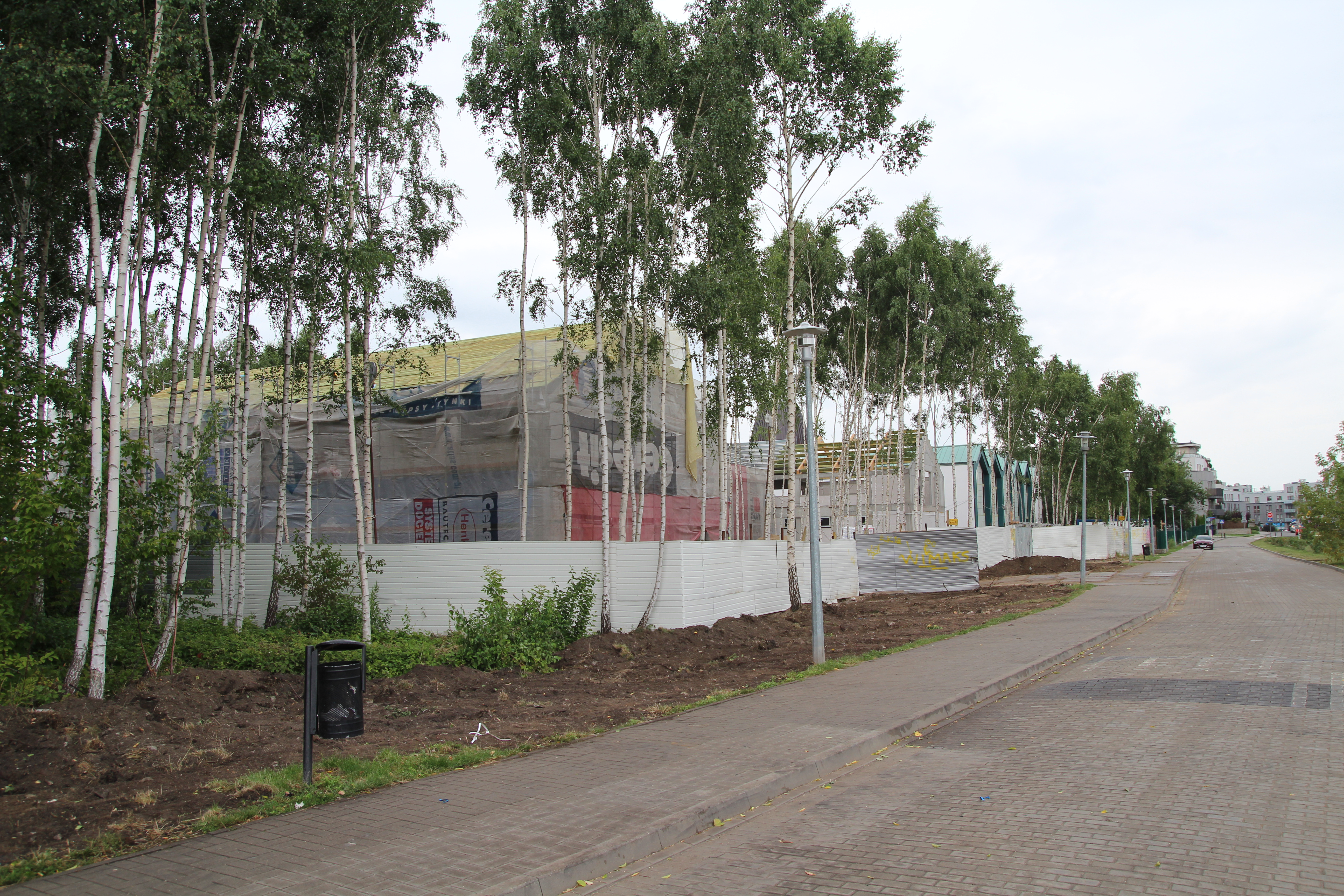 school construction site, Woroczuka